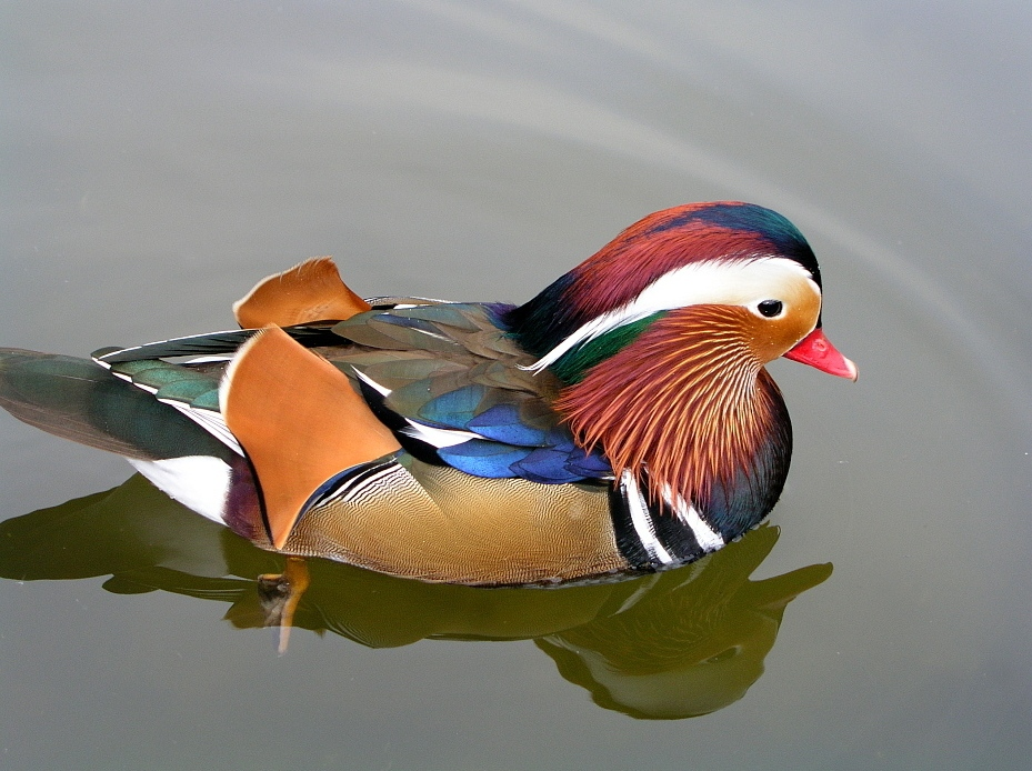 Mandarin Ente, Aix galericulata